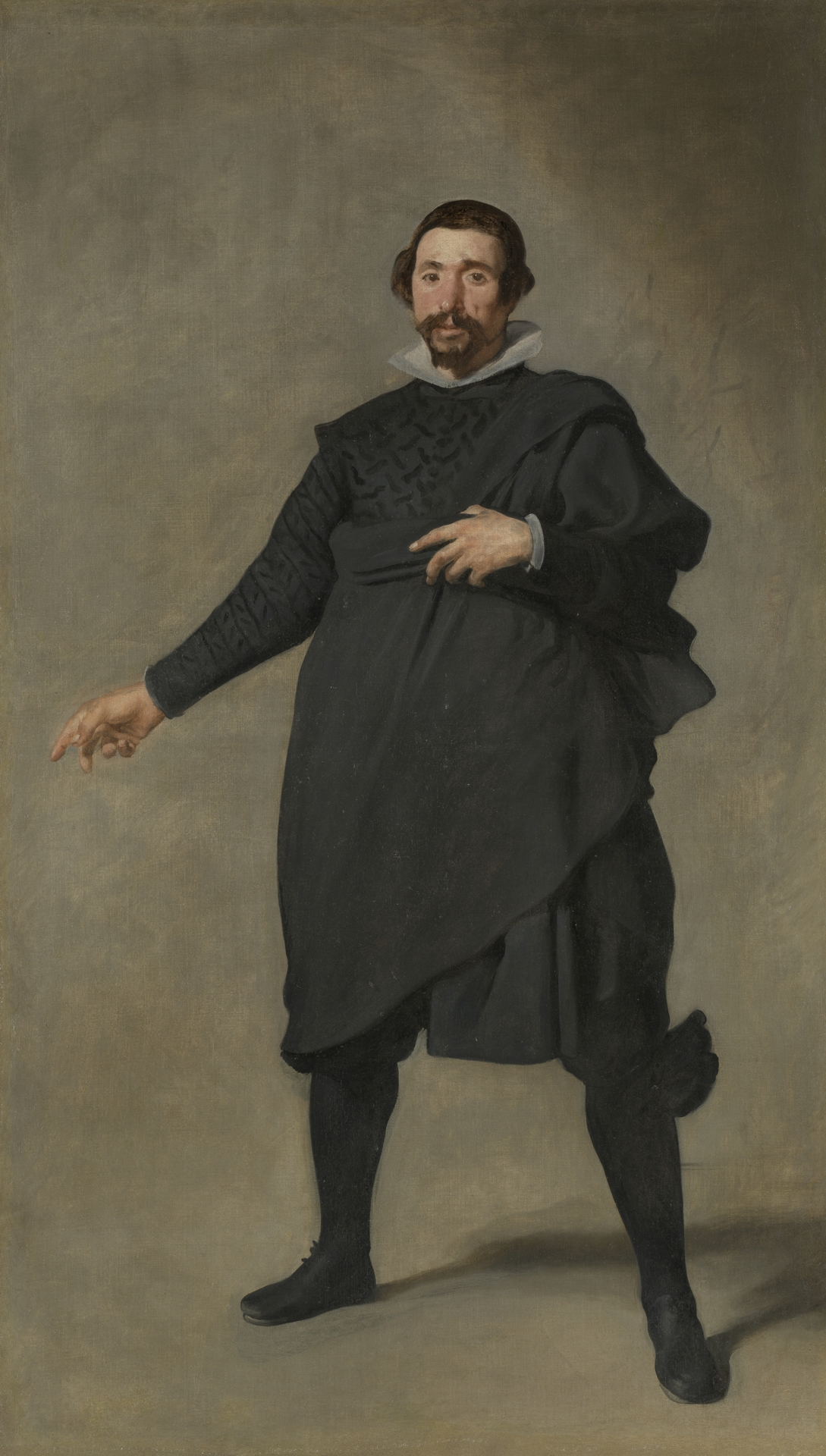 Retrato del bufón Pablo de Valladolid († 1648), que estuvo al servicio de la Corte española.